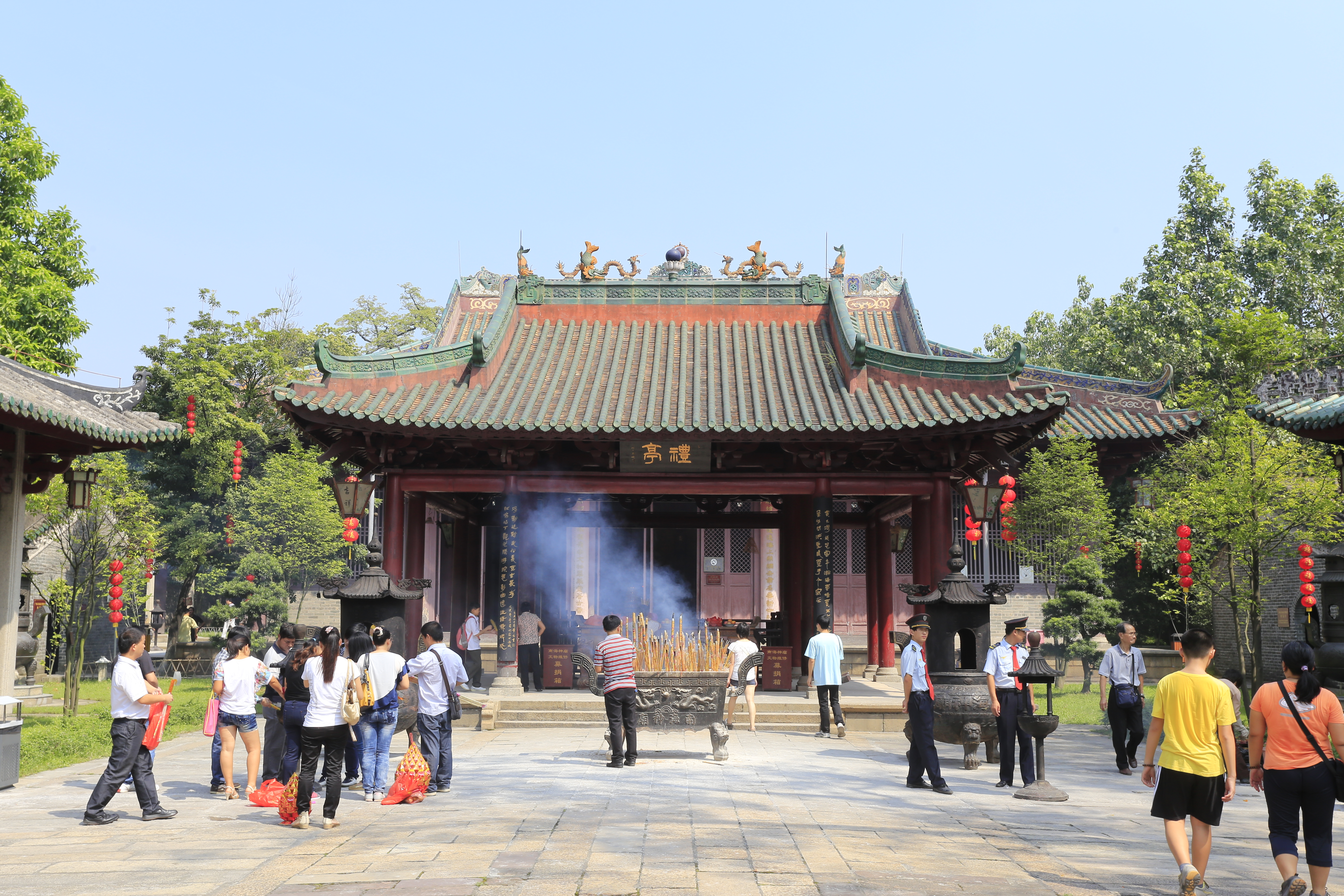 广州南海神庙 礼亭